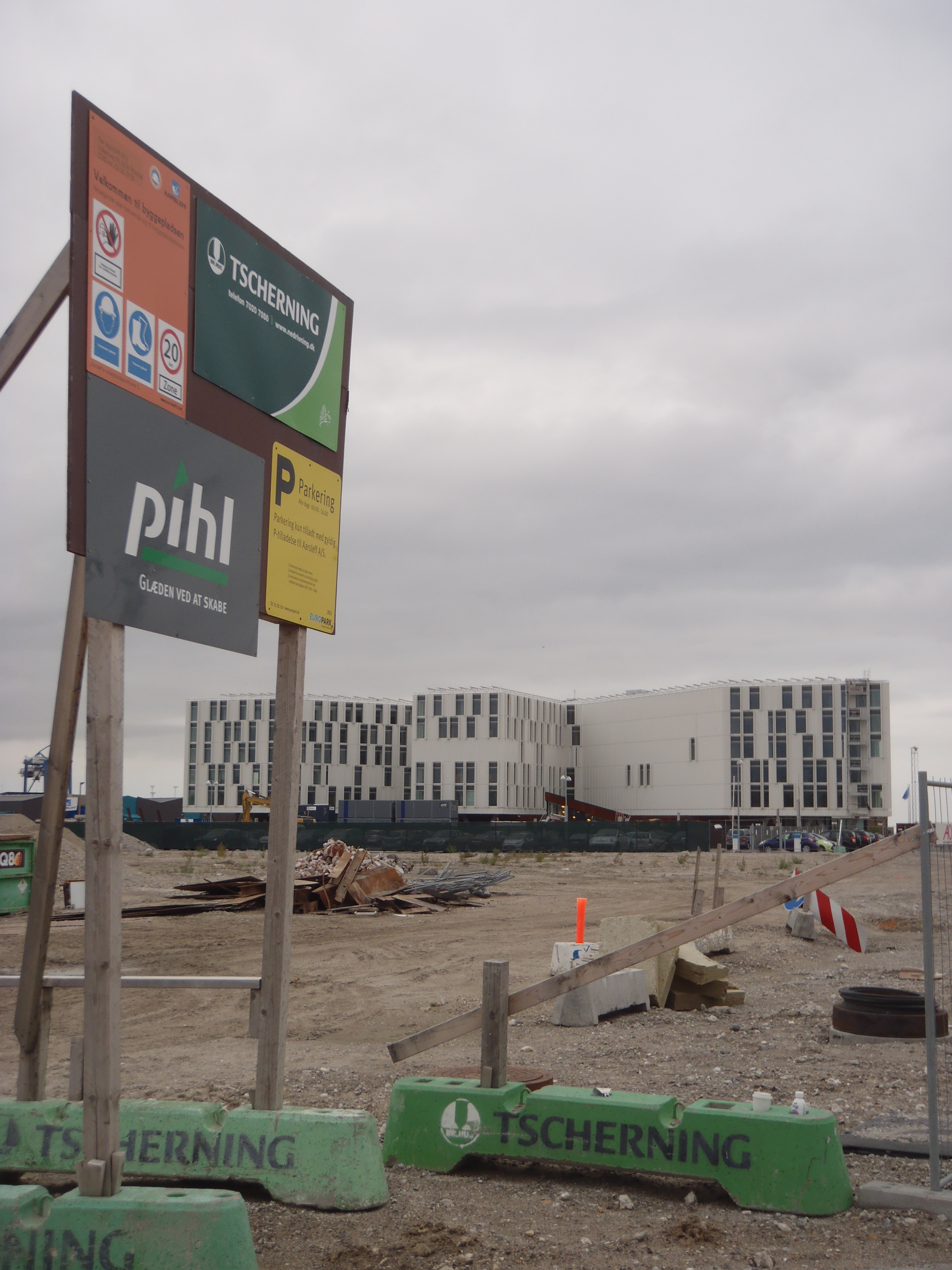 FN Byen med byggeplads og skilt med Tscherning og E. Phil & Søn.